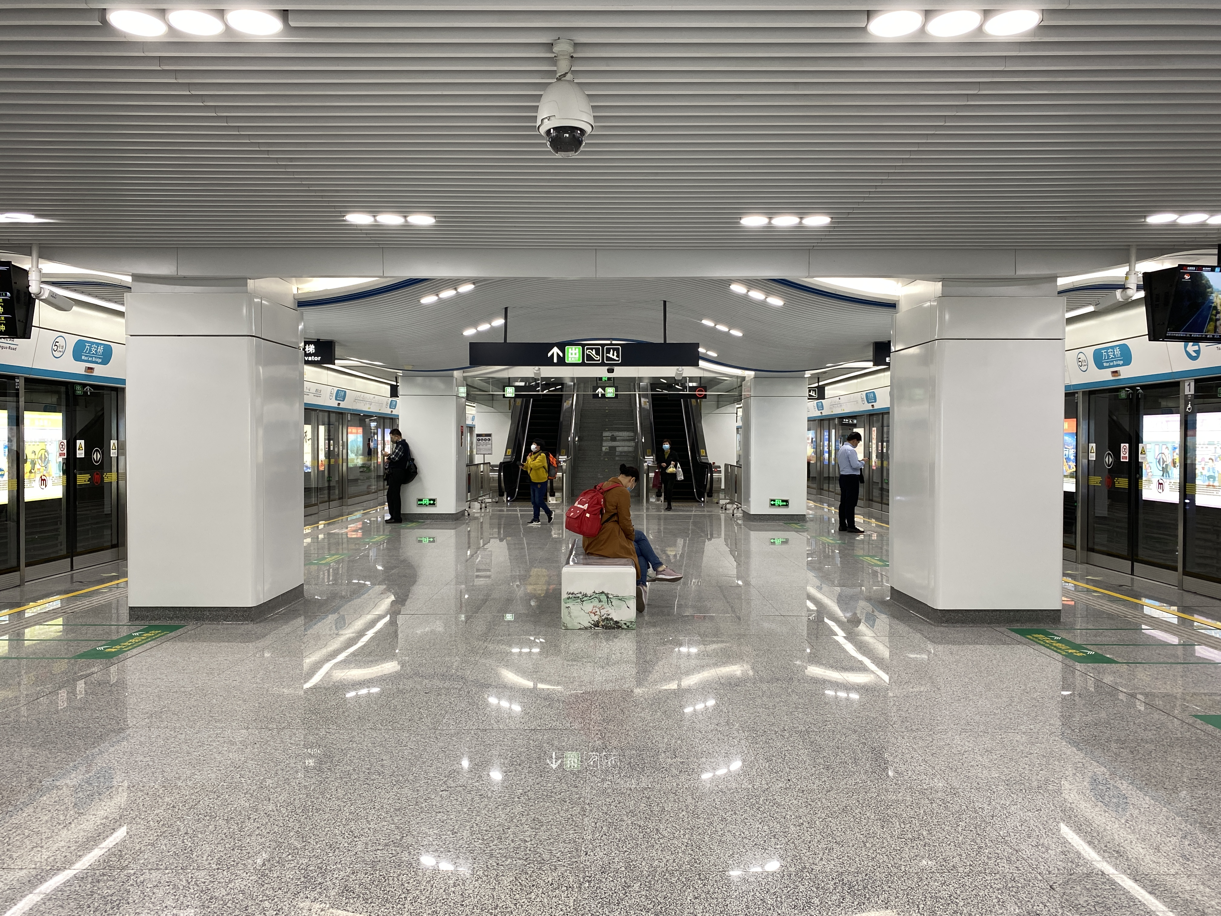 万安桥站站台